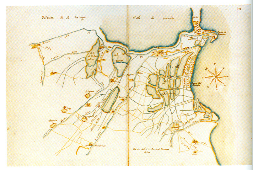 Pianta del territorio di Ravenna - XVII secolo. Acquerello e inchiostro su carta, 700x450 mm.